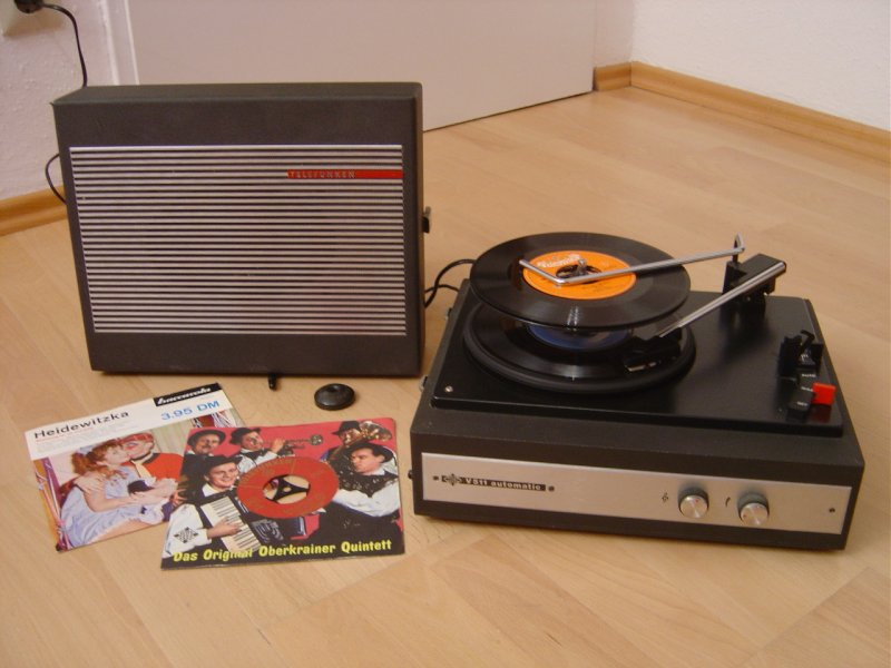 Telefunken V511 automatic (Schallplattenspieler). Historischer Koffer-Stereo-Schallplattenspieler aus den 1960ern mit vollautomatischer Wechslerspindel für bis zu acht Platten. Trotz der geringen Größe kann das Gerät auch LPs abspielen. Das Gerät verfügt über einen drehbaren Nadelträger und lässt sich auf 78 U/min schalten, so dass sich auch Grammophonplatten abspielen lassen. Der Lautsprecher stellt gleichzeitig den Deckel des Geräts dar.